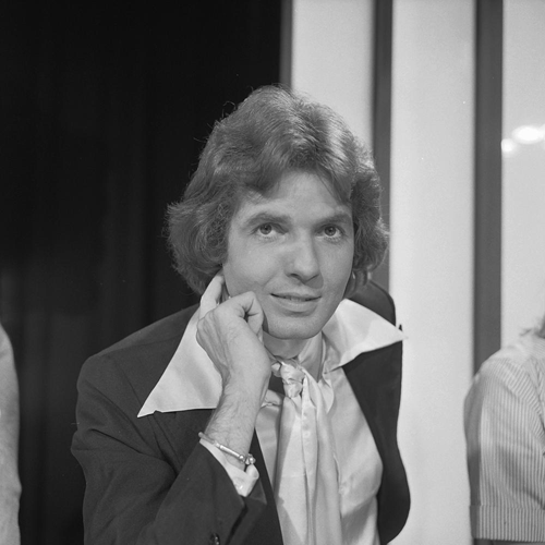 Chris Roberts in het Nederlandse televisieprogramma The Eddy Go Round Show in 1976